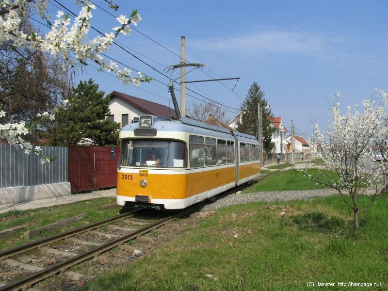 Trmvai Timisoara, Ronat